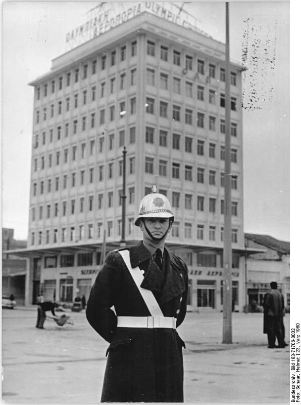 Zentralbild Schaar-23.3.1960 Erste Fahrt des FDGB-Urlauberschiffes "Völkerfreundschaft". Ende Februar 1960 startete das erste FDGB-Urlauberschiffe "Völkerfreundschaft" zu einer 27tägigen Ferienreise von Rostock aus ins Mittel- und Schwarze Meer. UBz: Verkehrspolizist in Athen.